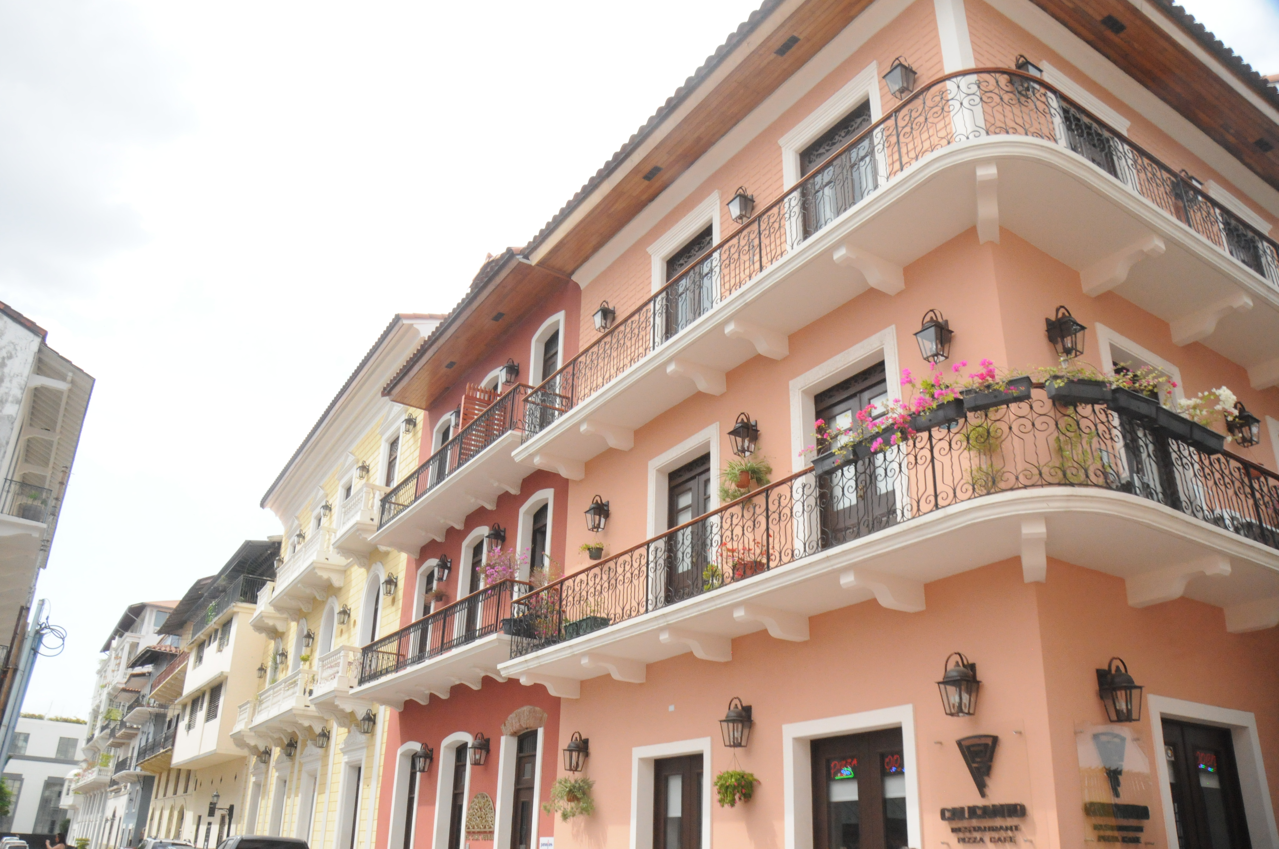 Old Panama City - Casco Viejo - Panama